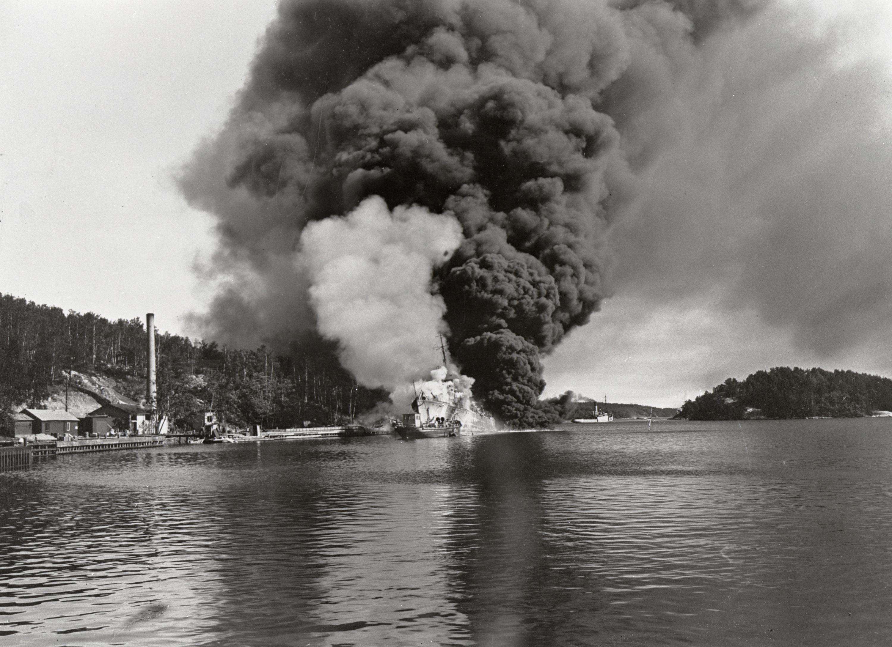 Jagaren HMS Klas Uggla (4) i lågor under Horsfjärdskatastrofen i Märsgarnssund.